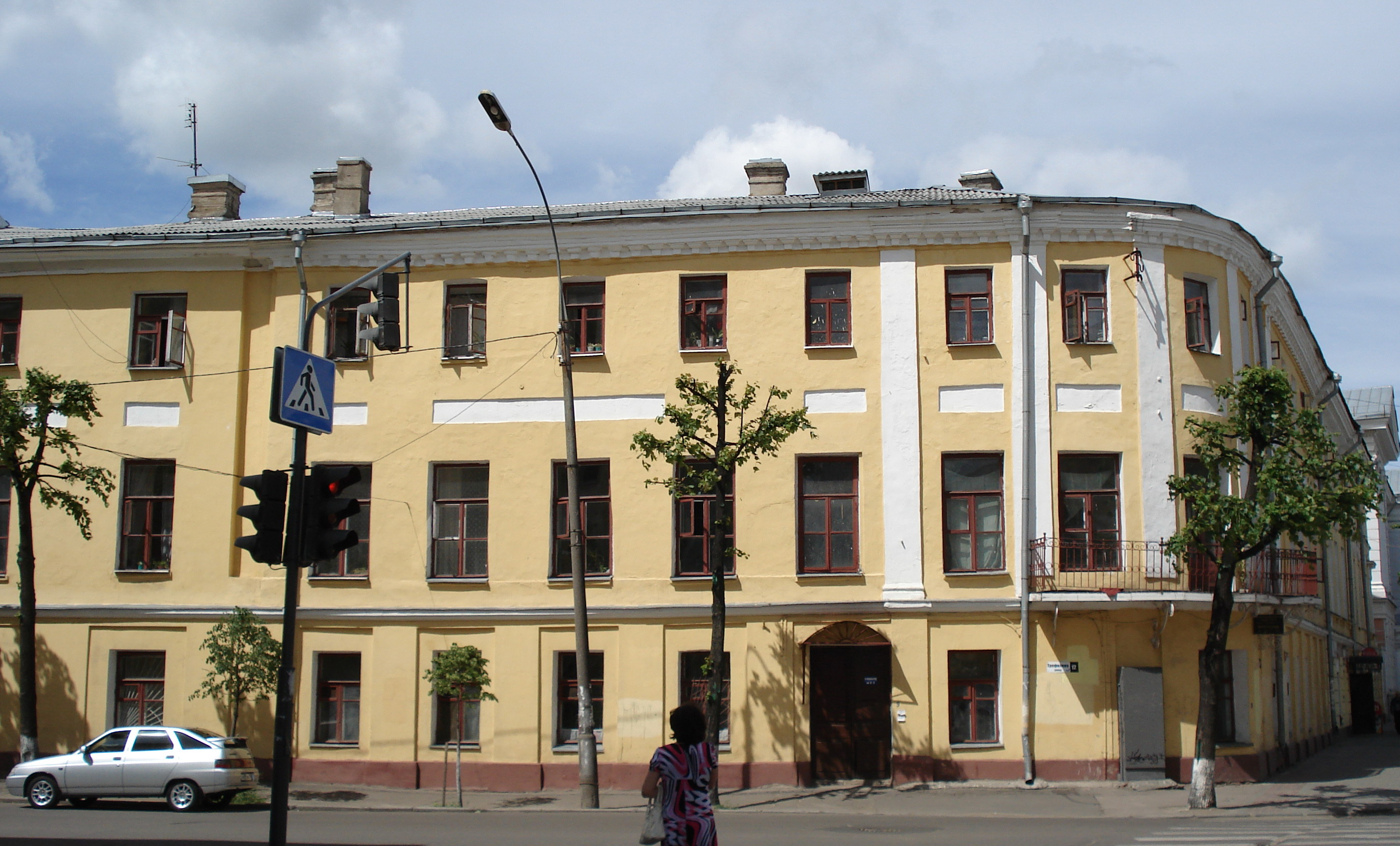 Дом, в котором Л. Трефолев жил в Ярославле в 1870-е годы. Улица (ныне Трефолева).